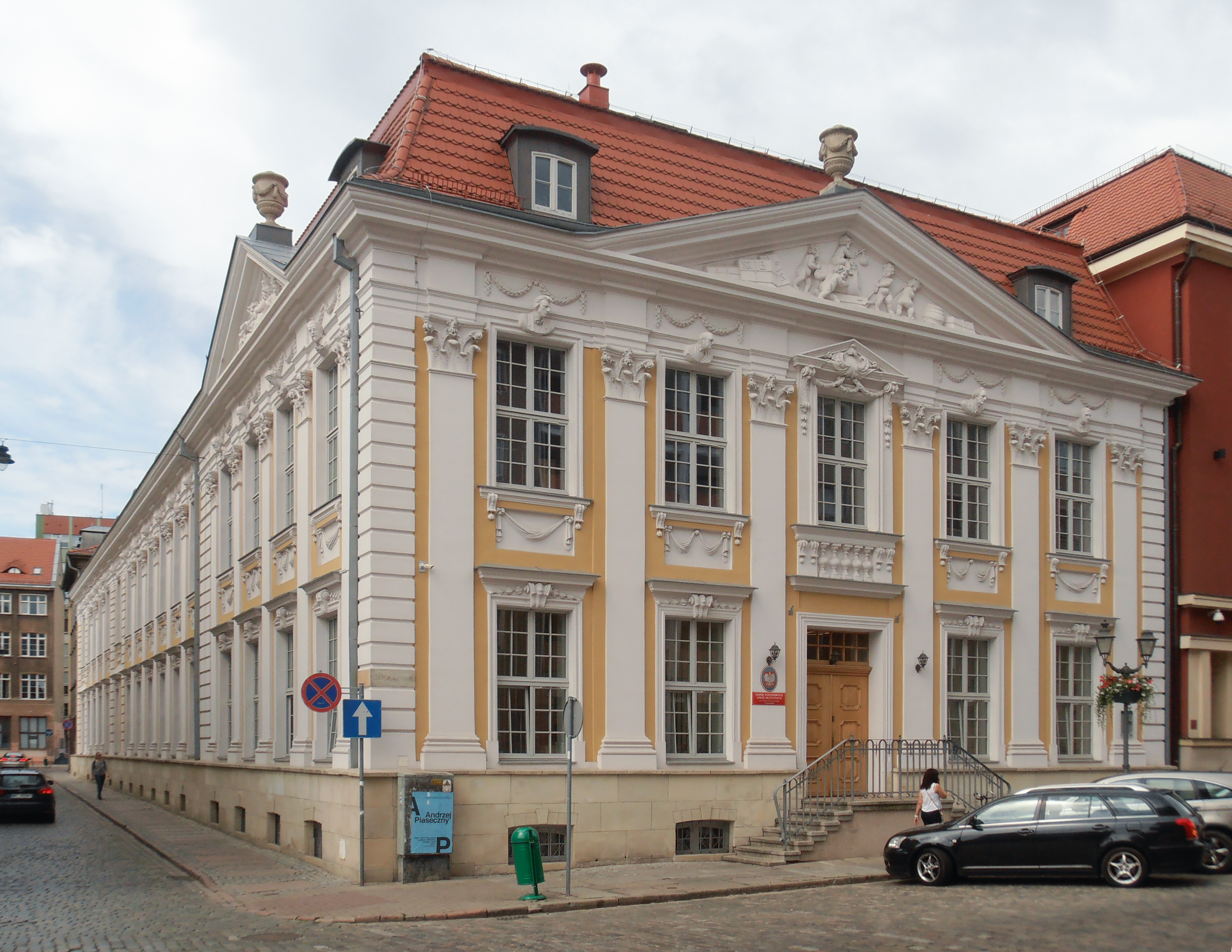 Szczecin, ul. Staromłyńska 13 - Pałac Klasycystyczny (obecnie szkoła muzyczna) z XVIII w.